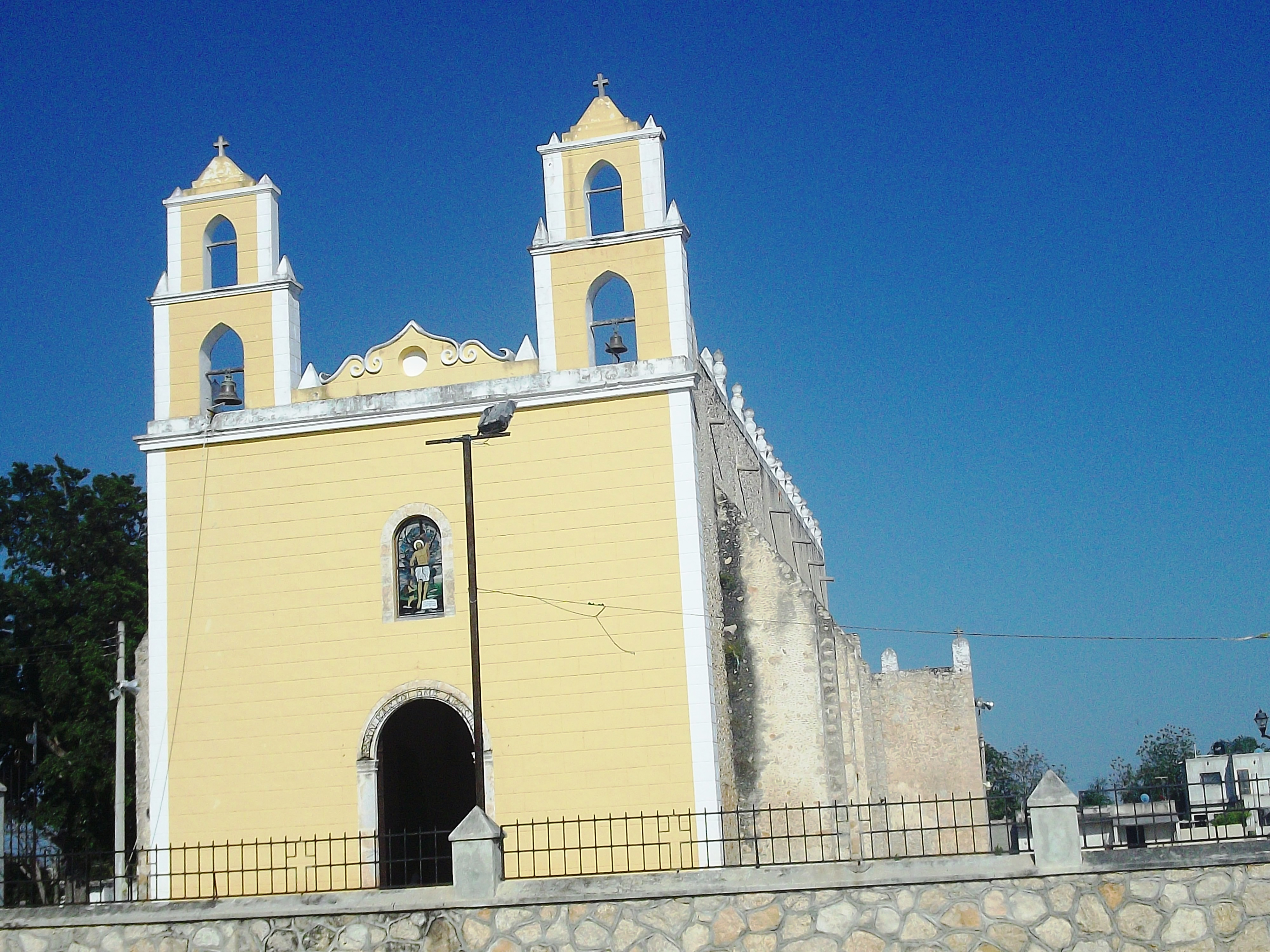 Iglesia de Nolo, Yucatán.